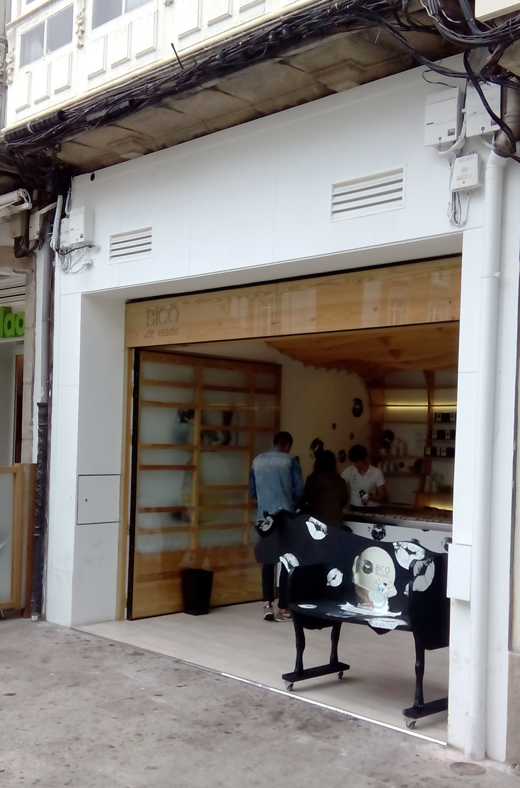 Franquía Bico de Xeado, franxa O Cancelo na Coruña